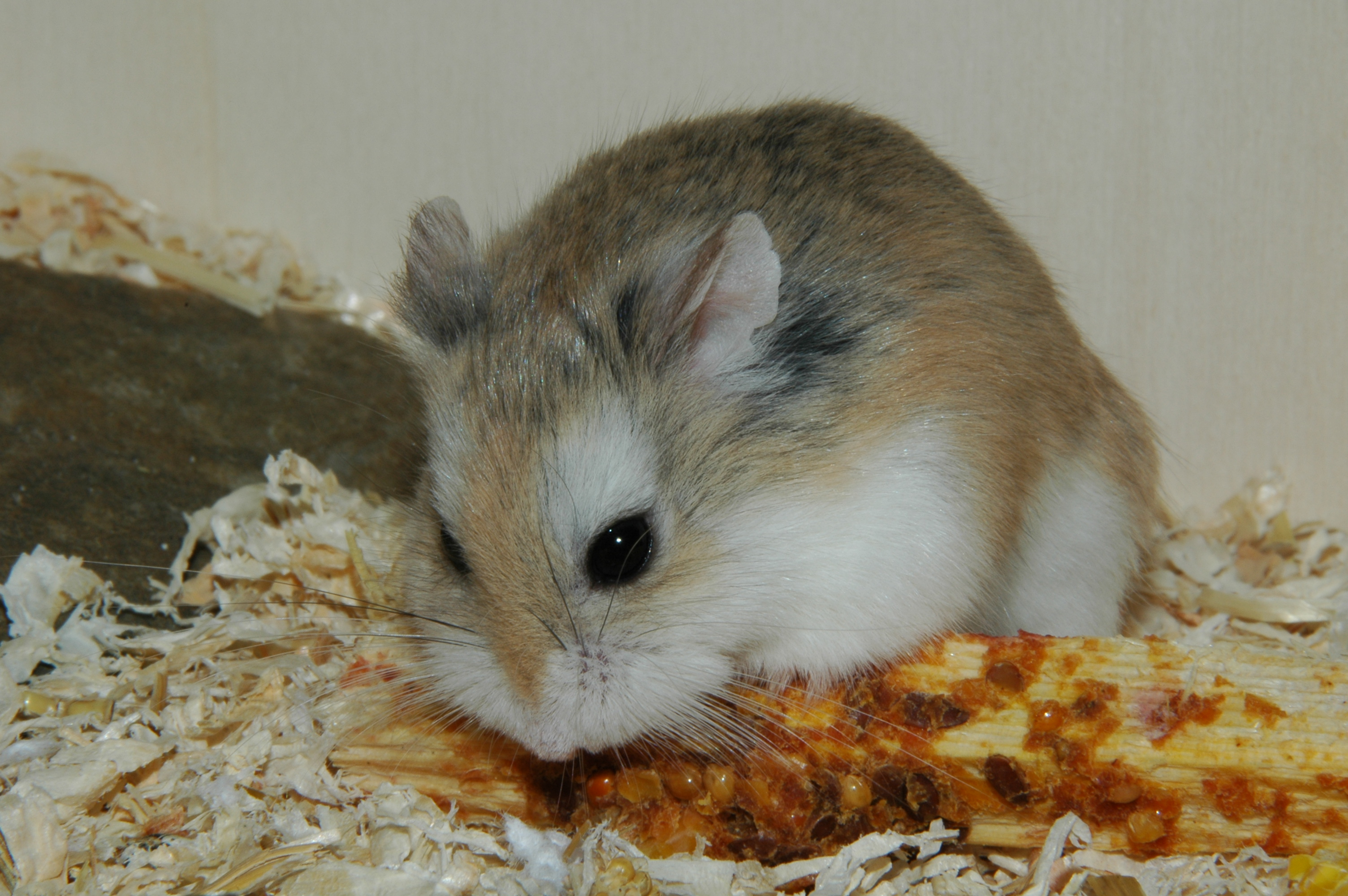 Phodopus roborovskii, male, eleven months old